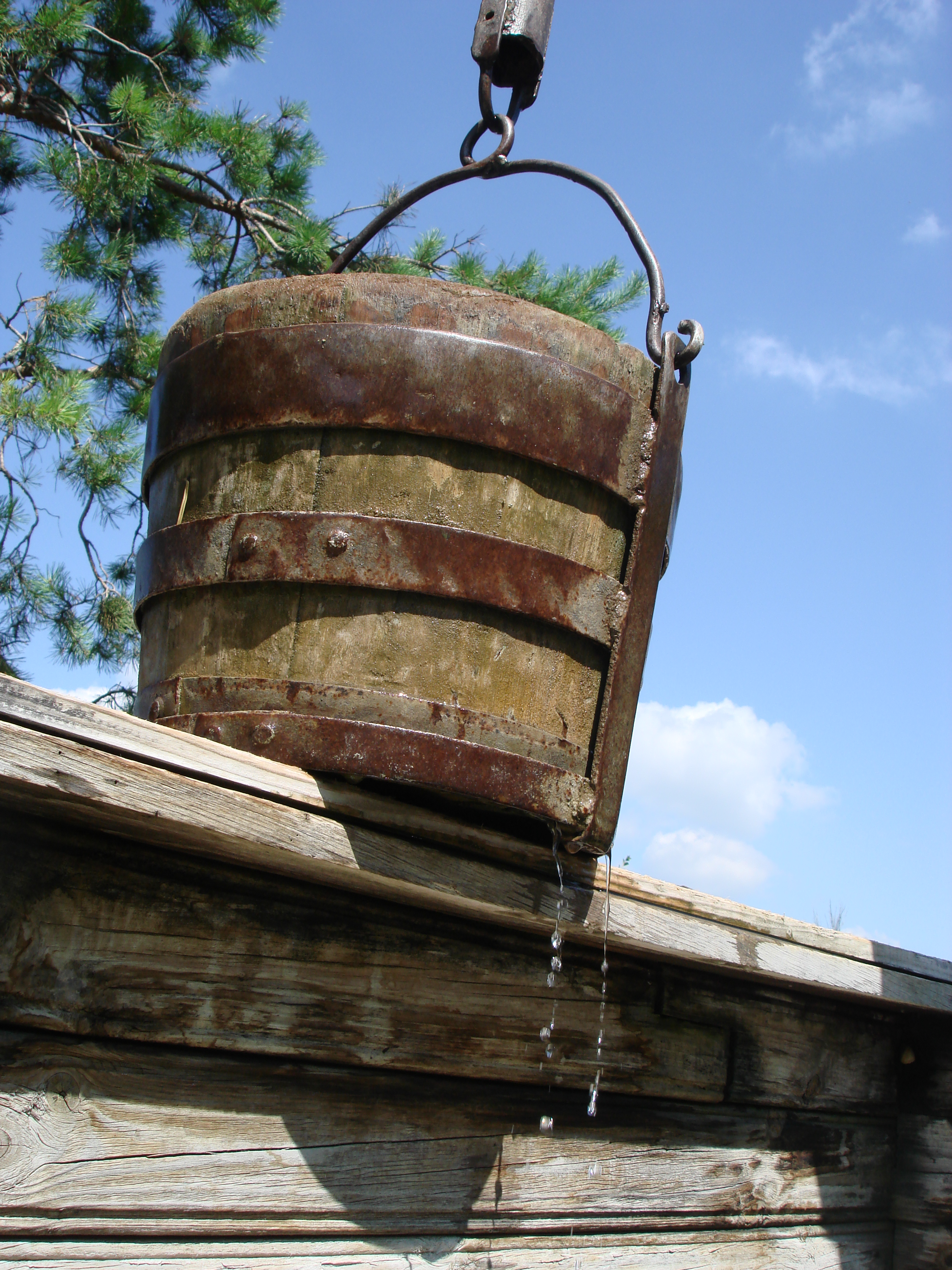 Ведро с водой на колодце, Страшенский район, Молдавия